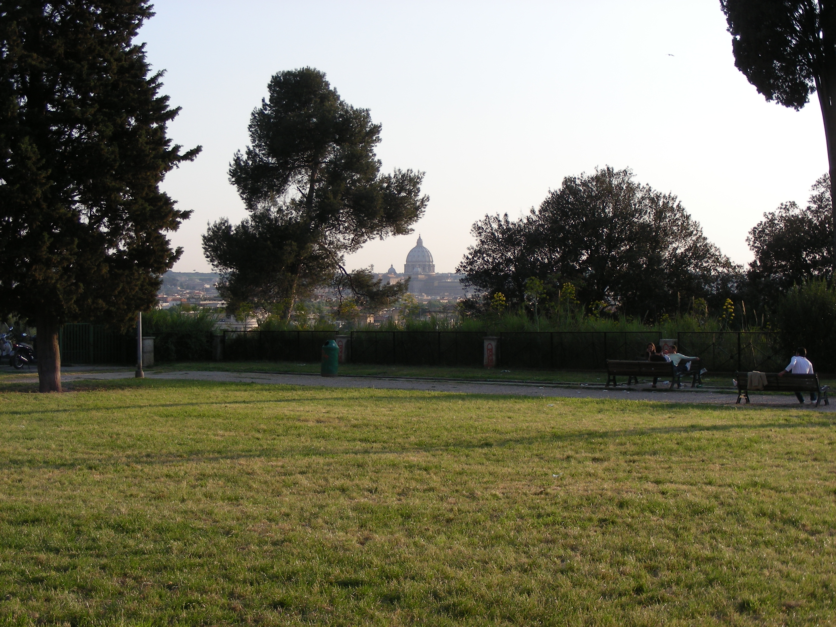 Vue sur la ville éternelle depuis le jardin.